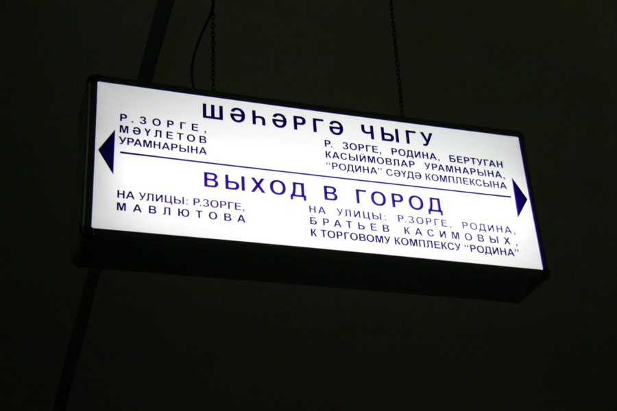 Kazan Metro (Казанский метрополитен)